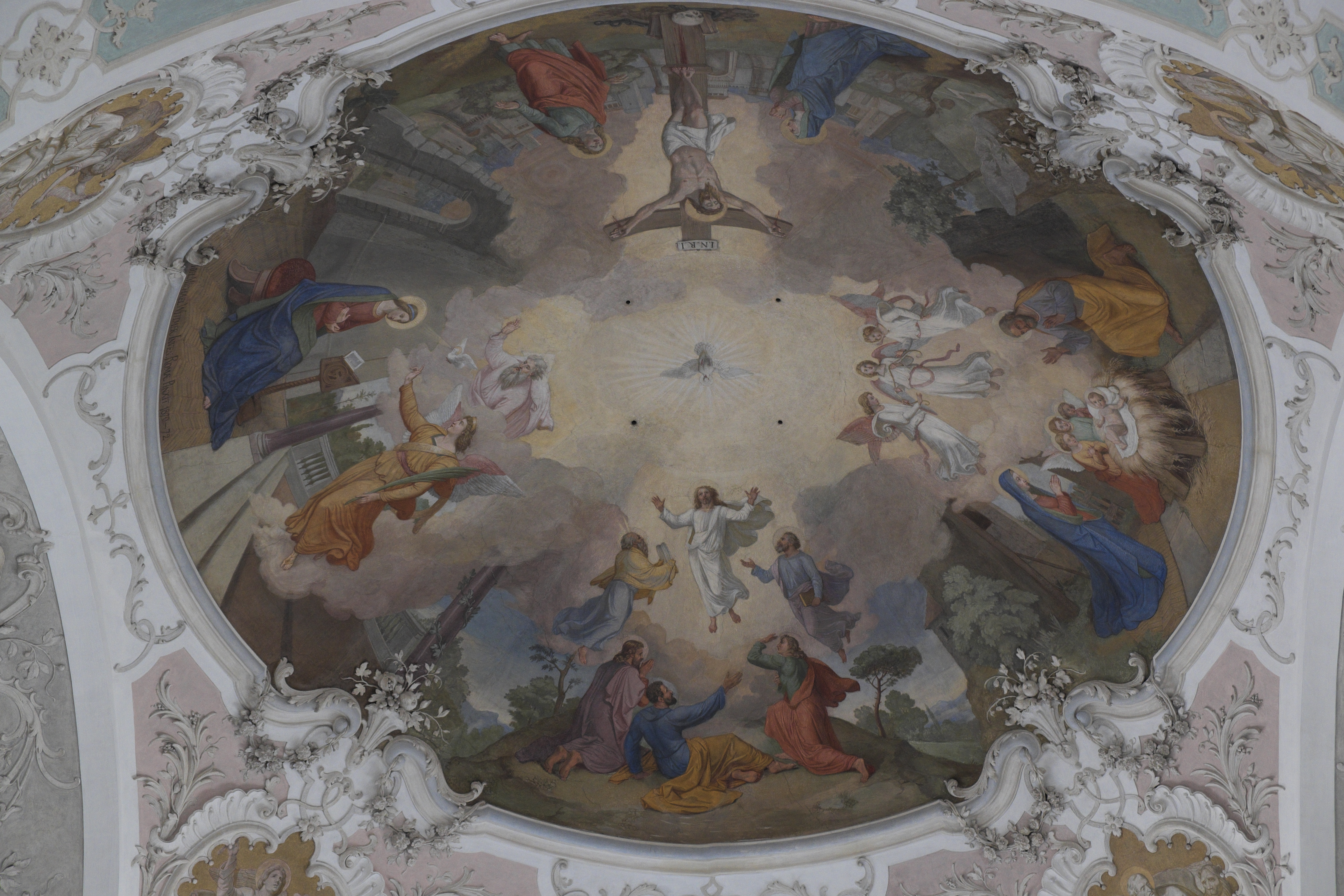 Katholische Pfarrkirche St. Nikolaus in Murnau am Staffelsee im Landkreis Garmisch-Partenkirchen (Bayern/Deutschland), Chorfresken von Johann Michael Wittmer und Joseph Anton Schwarzmann, von 1871/72; Darstellung: Verkündigung, Geburt, Verklärung und Kreuzigung Christi